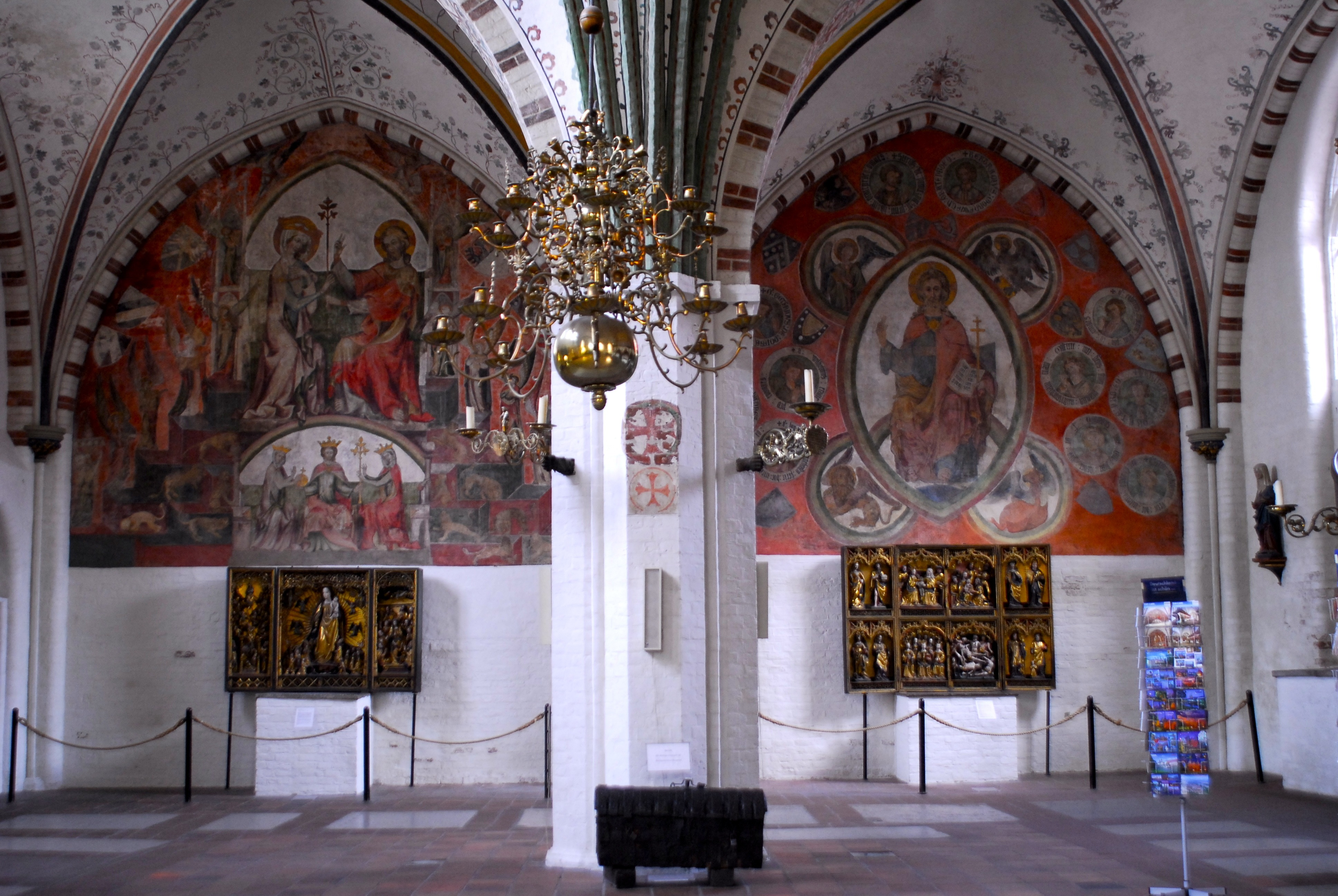 Lübeck wurde um 1000 nChr als slawische Siedlung an der Trave gegründet. Graf Adolf II von Schauenburg gründet 1143 eine Kaufmannssiedlung auf dem Platz der zuvor zerstörten slavischenSiedlung. Nachdem diese 1157 durch Feuer wiederum zerstört wurde wird Lübeck 1159 von Heinrich dem Löwen neu gegründet. 1160 dann erhielt Lübeck das Soester Stadtrecht und ein Jahr später das Artlenburger Privileg. Damit war die Stadt den gotländischen Kaufleuten gleich gestellt und konnte Handel treiben. Von Kaiser Friedrich II erhielt die Stadt 1226 den Reichsfreibrief und wurde damit reichsunmittelbare Stadt. Lübeck ist die zweitgrößte Stadt Schleswig-Holsteins und ist flächenmäßig die größte Stadt. Die Altstadt gehört zum UNESCO Kulturerbe.